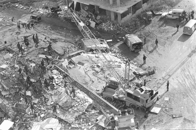 אסון צור הראשון, פיצוץ בית הממשל הצבאי בצור.